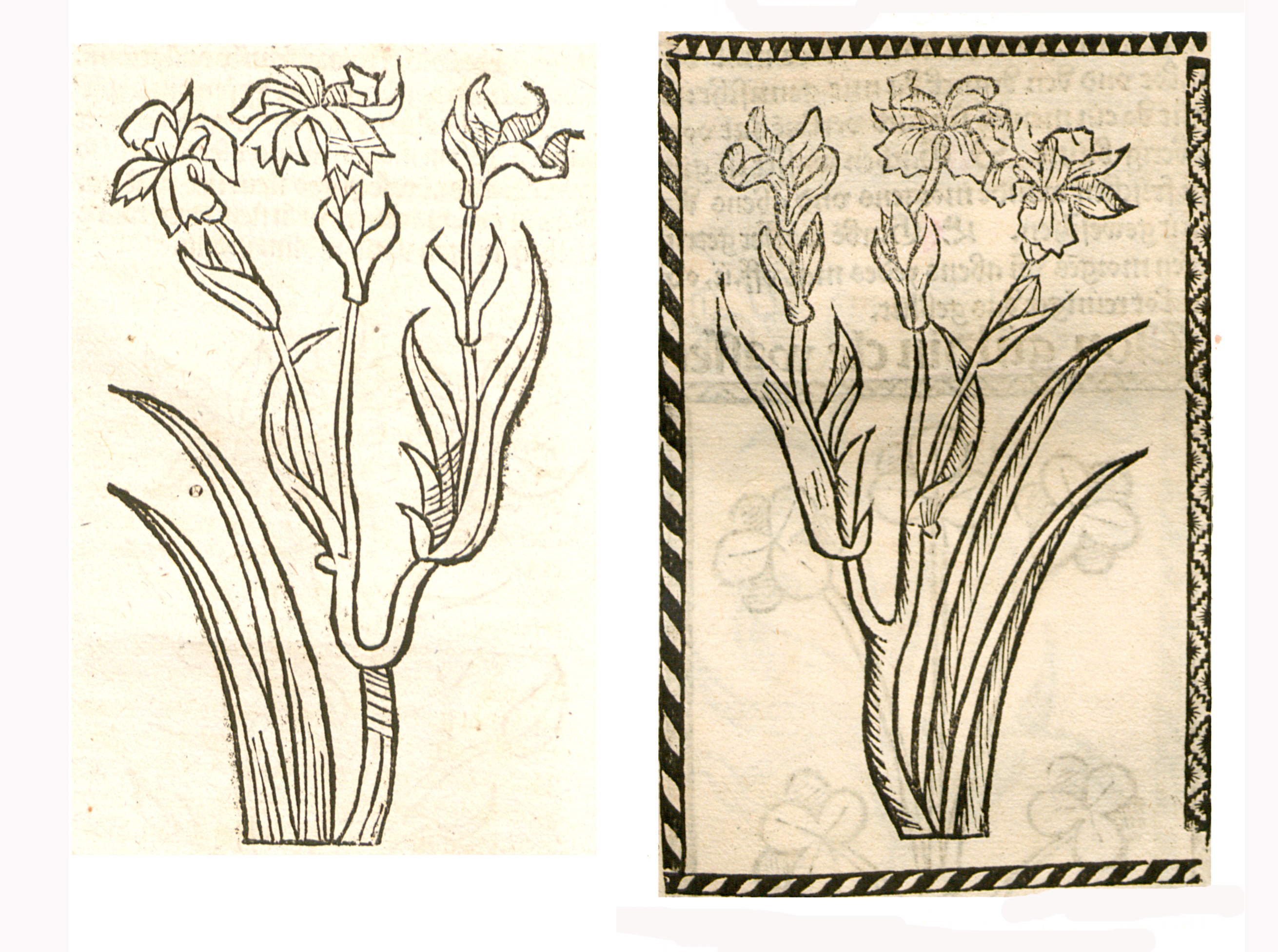 Abbildung von Gel Gilgen (Iris pseudacorus)